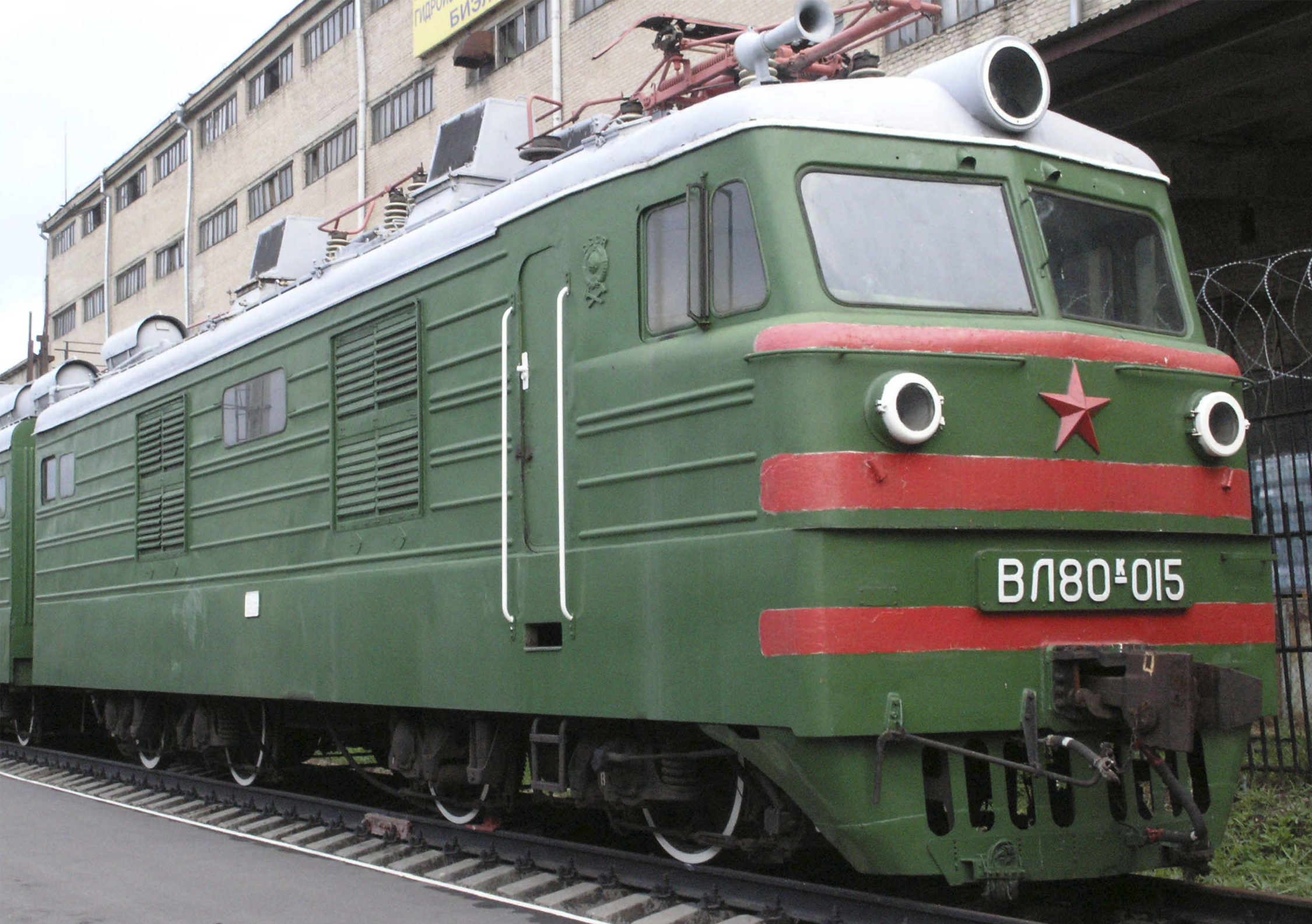 Электровоз построен в 1963 году Новочеркасским электровозостроительным заводом